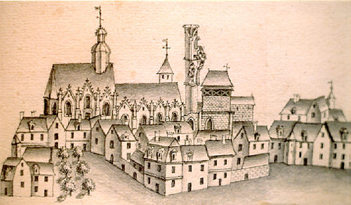 Ancien pilier de-La-Riche XIIe et XIIIe siècle, dessin réalisé au 18èm siècle, document société archéologique de Touraine n° 2696